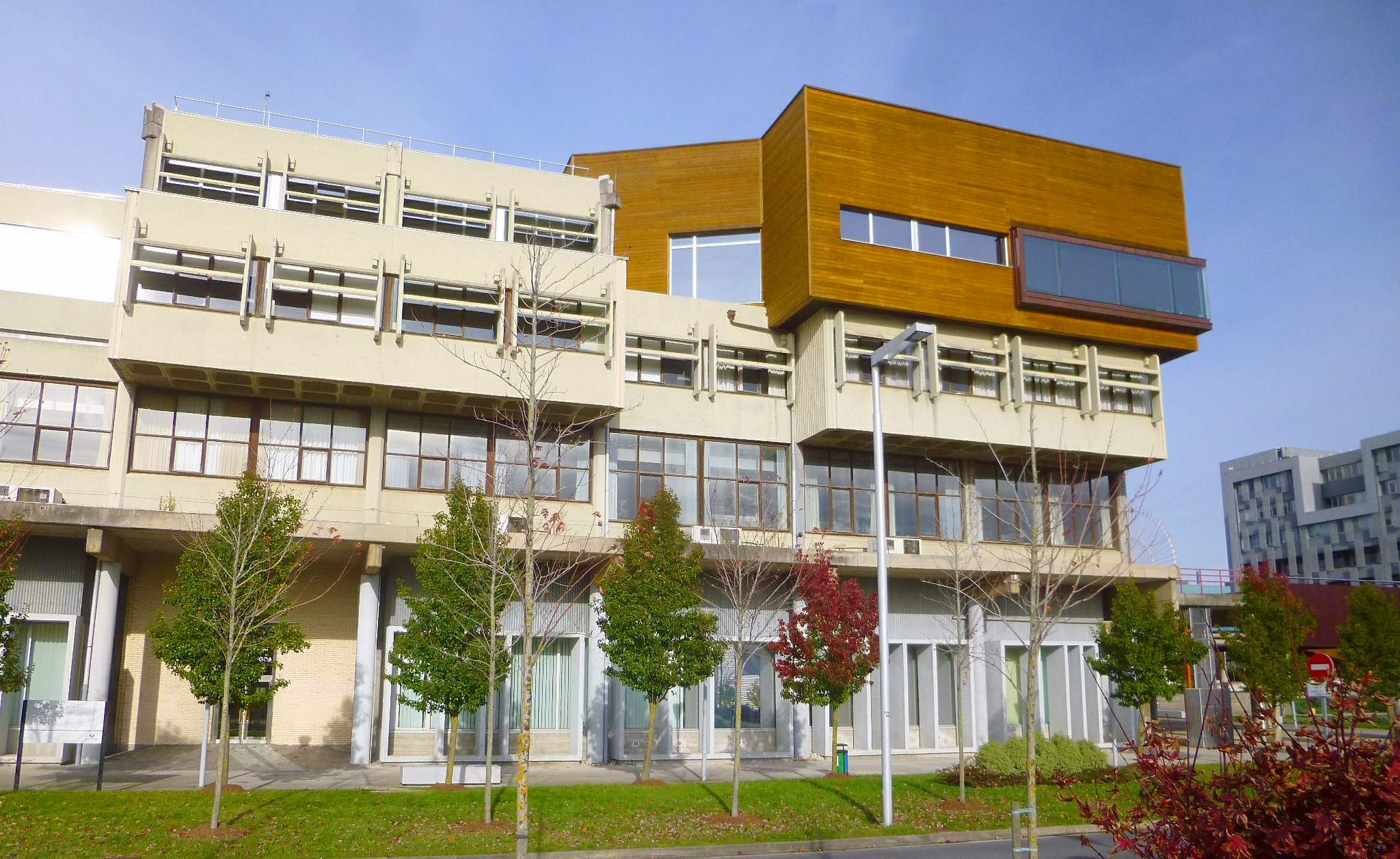 Lejona - Campus de Bizkaia de la UPV-EHU - Rectorado